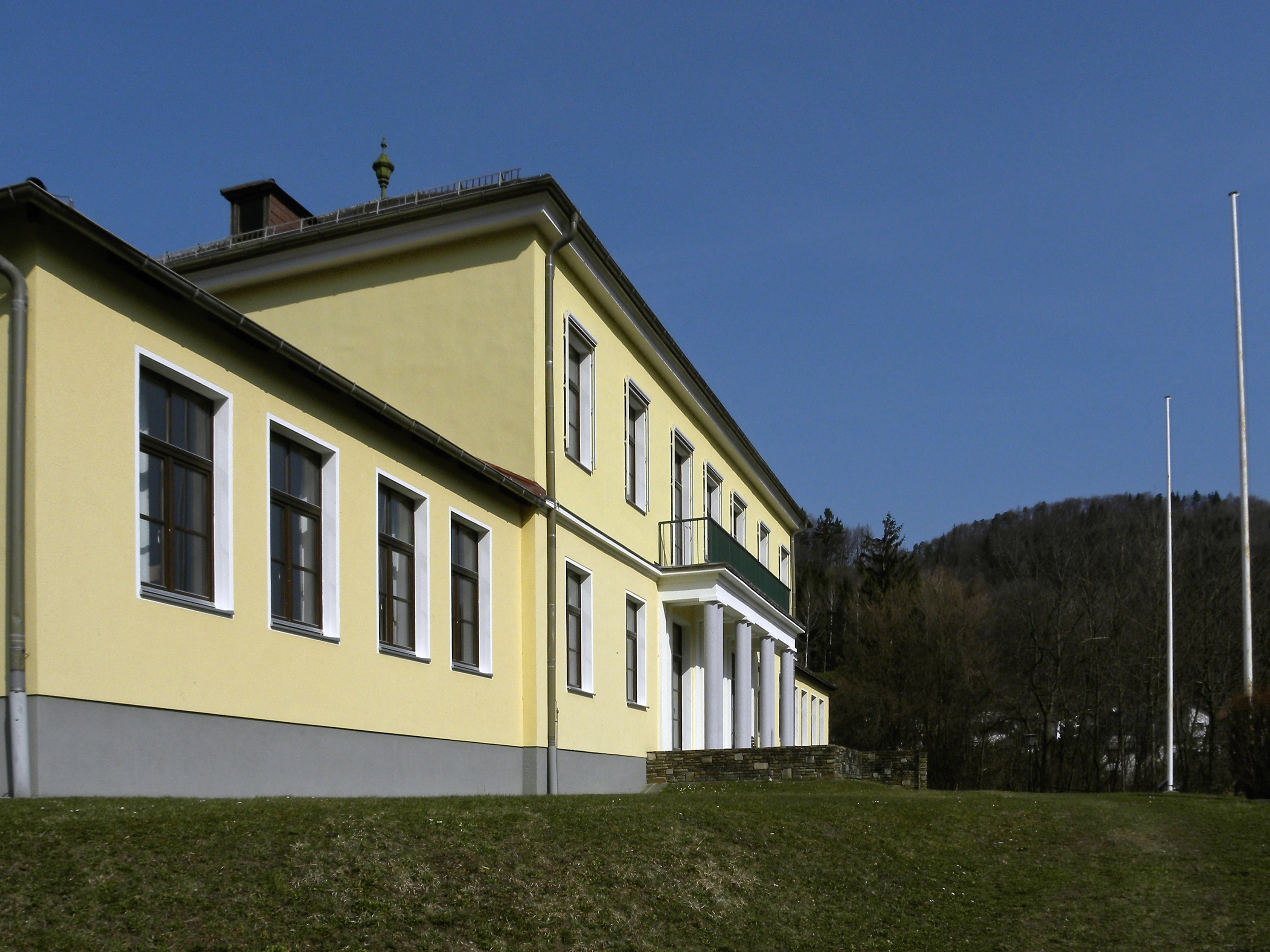 Das 1839 nach Plänen von Moritz von Löhr erbaute Schloss Berghof dient seit 1960 als Landesberufsschule.